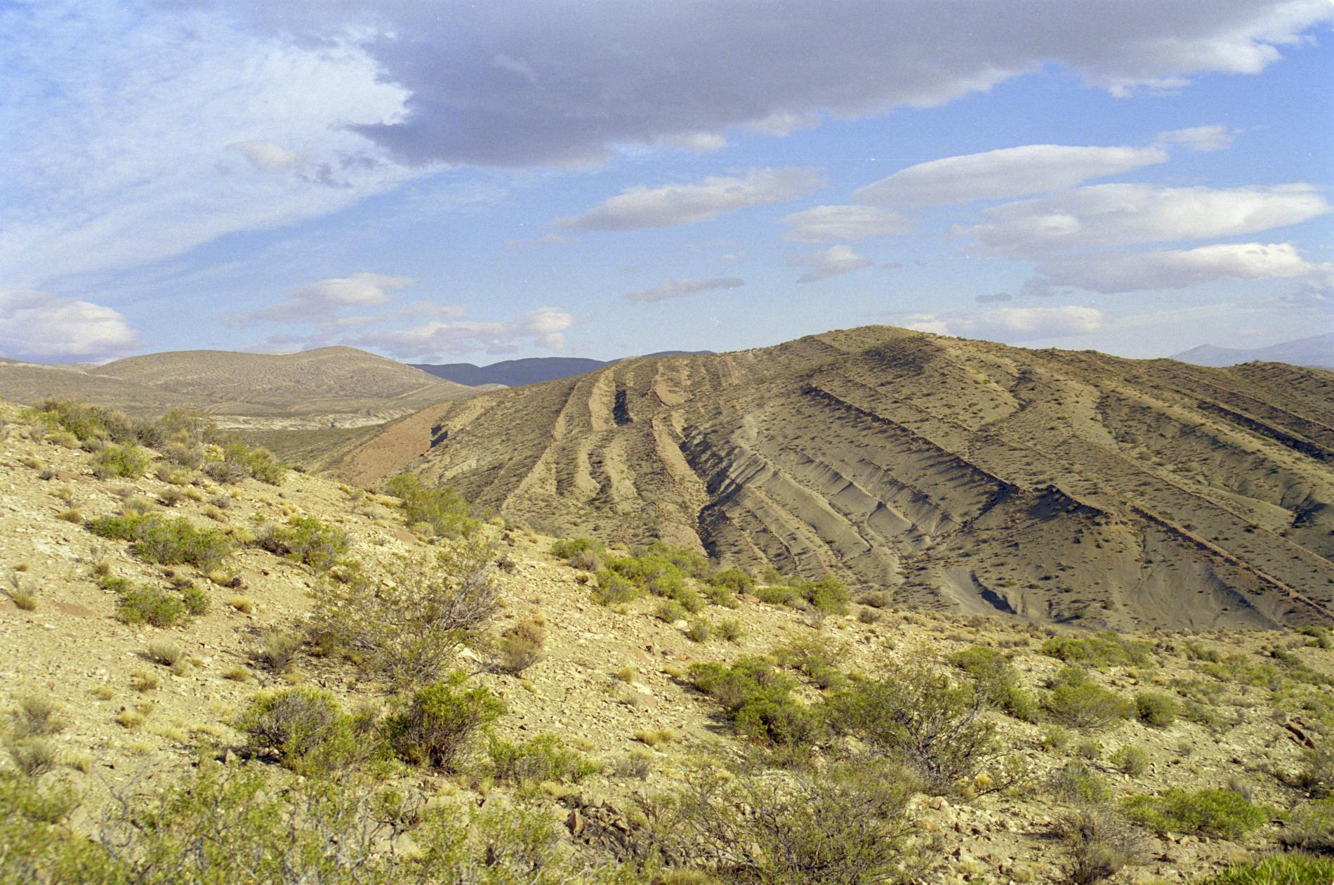 Formación Agrio en Aguada de la Mula. Panorámica 2